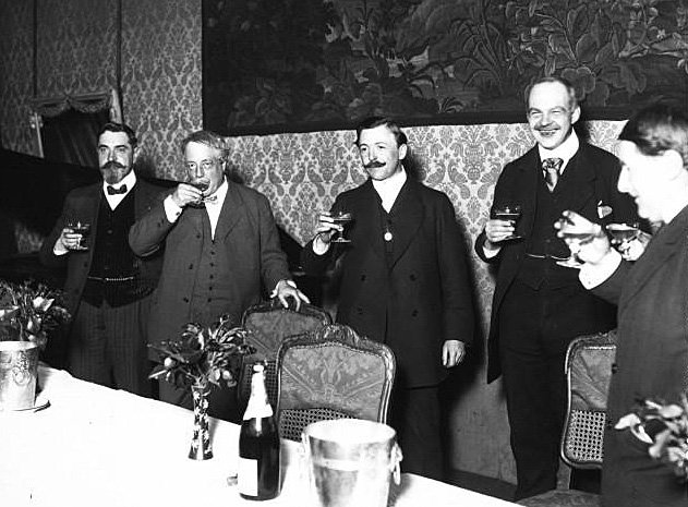 12-4-11, arrivée de Zislin à Paris : Hansy, Zislin, Wilette [3 hommes verre à la main] : [photographie de presse] . BNF